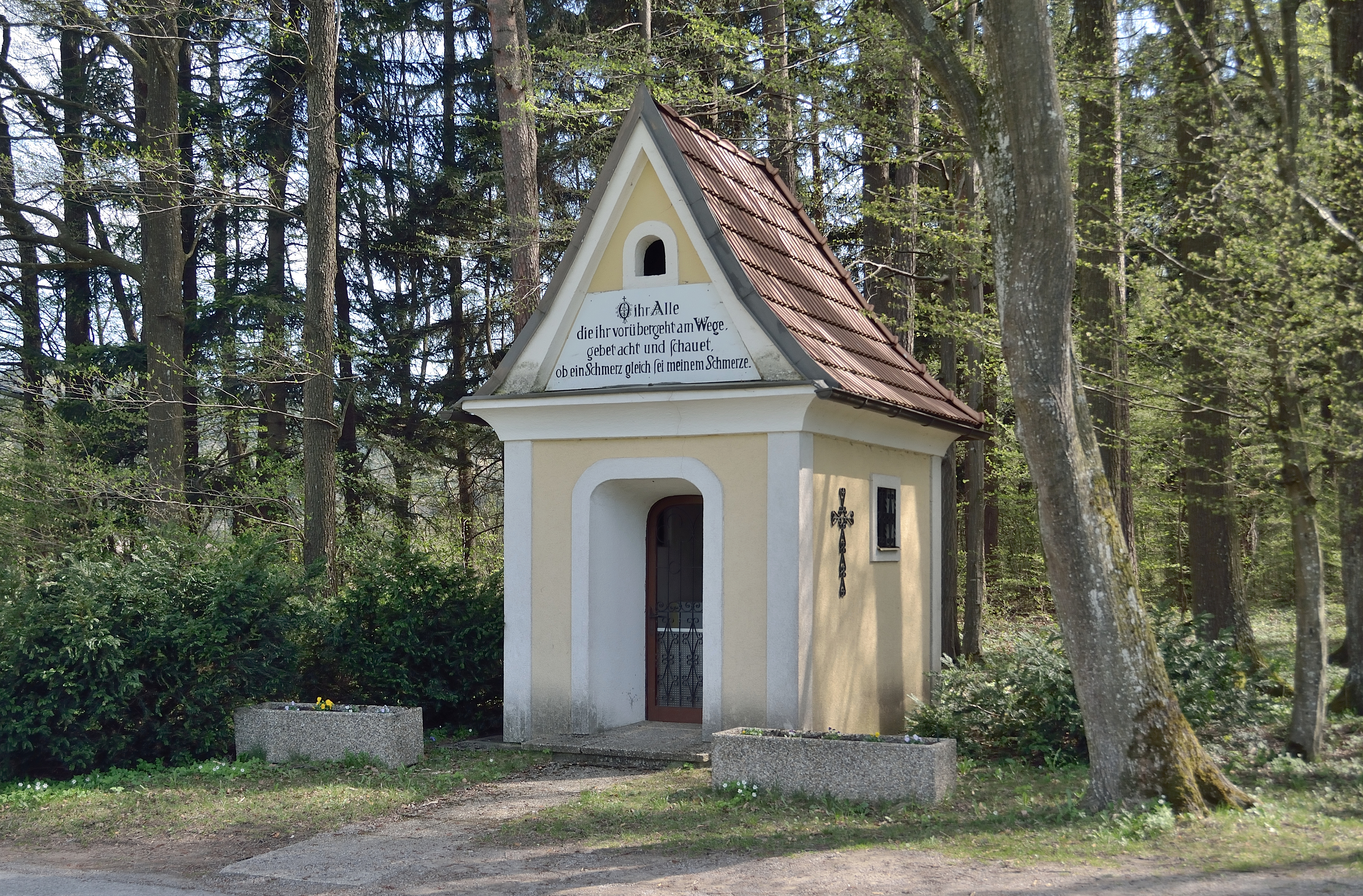 Die Edelhofkapelle an der Zufahrt zum Gut Edelhof in Rohrbach an der Gölsen, Niederösterreich.